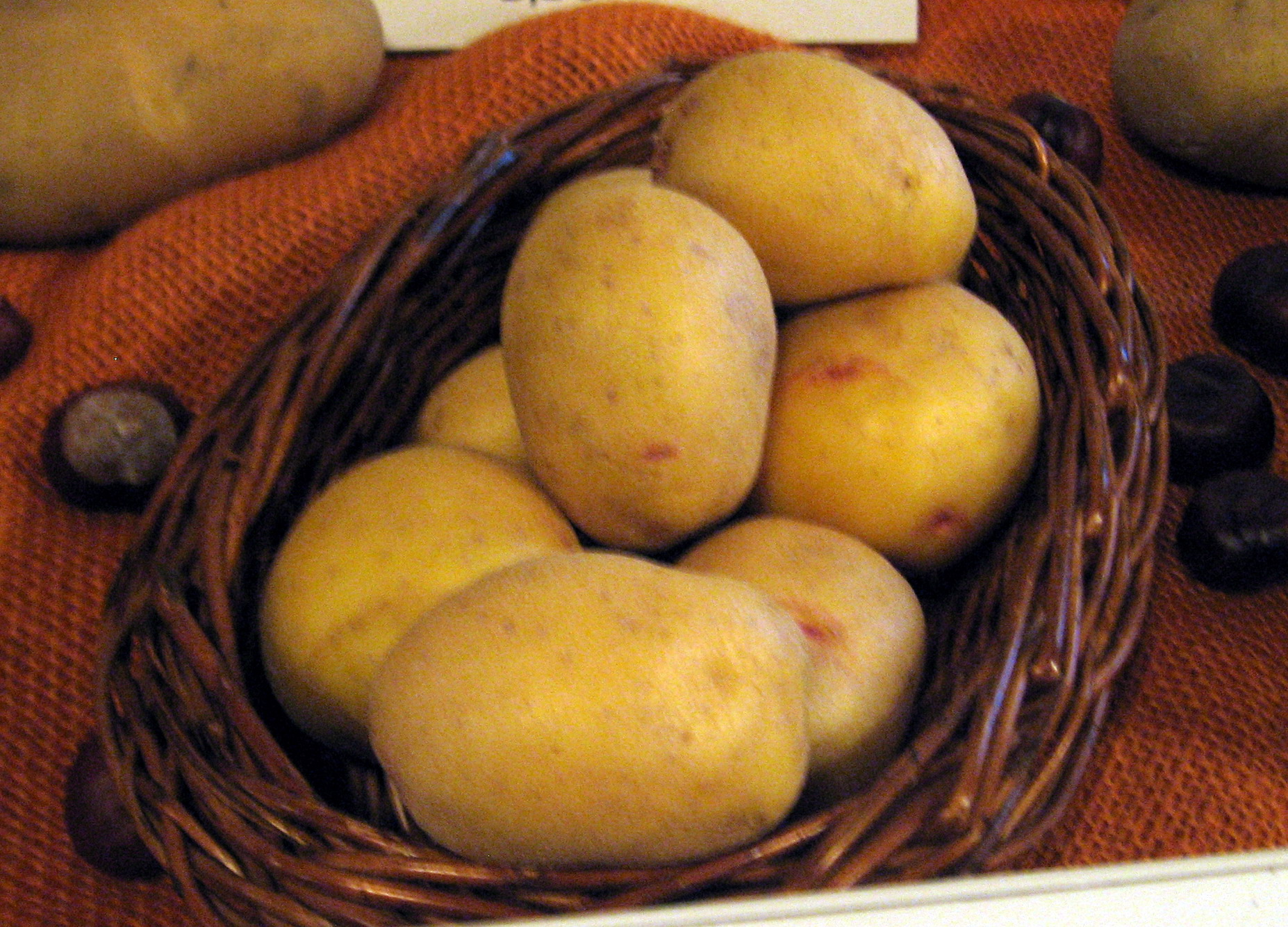 odrůda Quarta